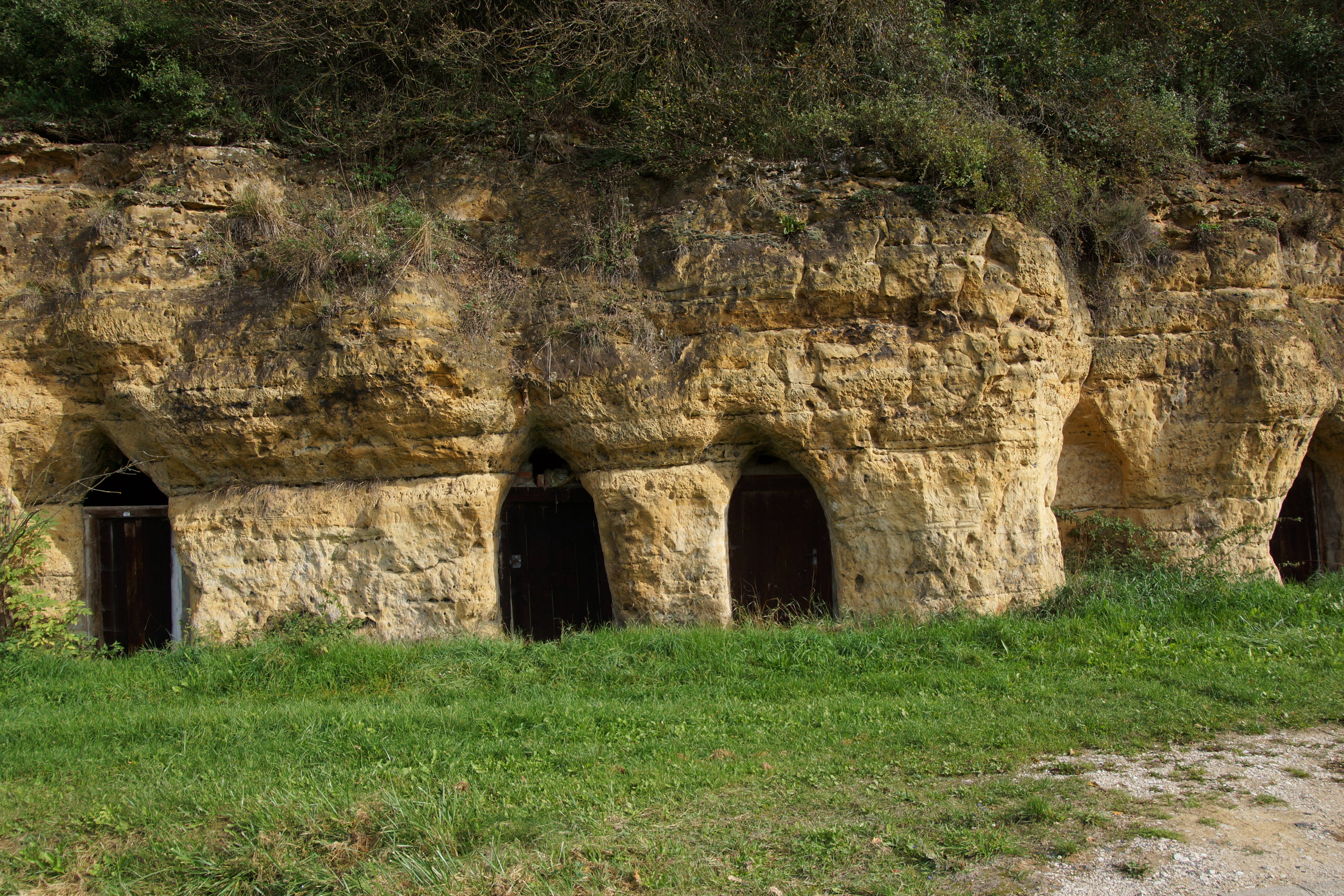 Niederhofen bei Pilsach in der Oberpfalz: Geokataster Bayern / Doggerfelswand bei Niederhofen / Geotop-Nummer: 373A030